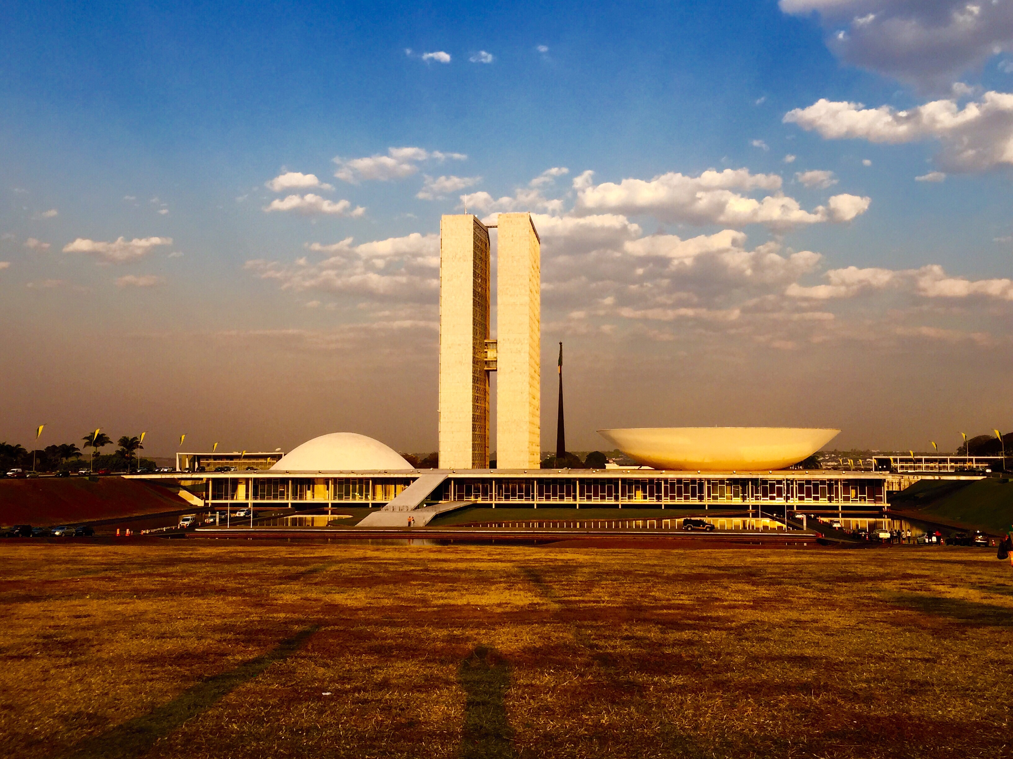 Conjunto urbanístico de Brasília construído em decorrência do Plano Piloto traçado para a cidade